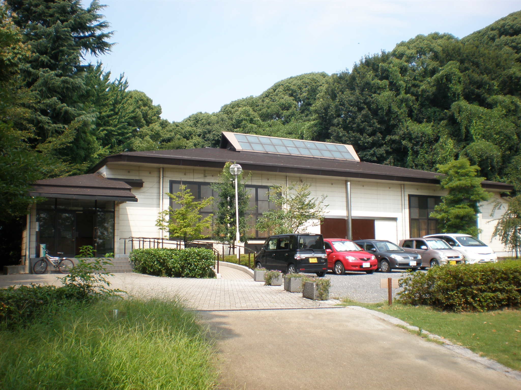 愛知県小牧市の小牧山にある堀の内体育施設